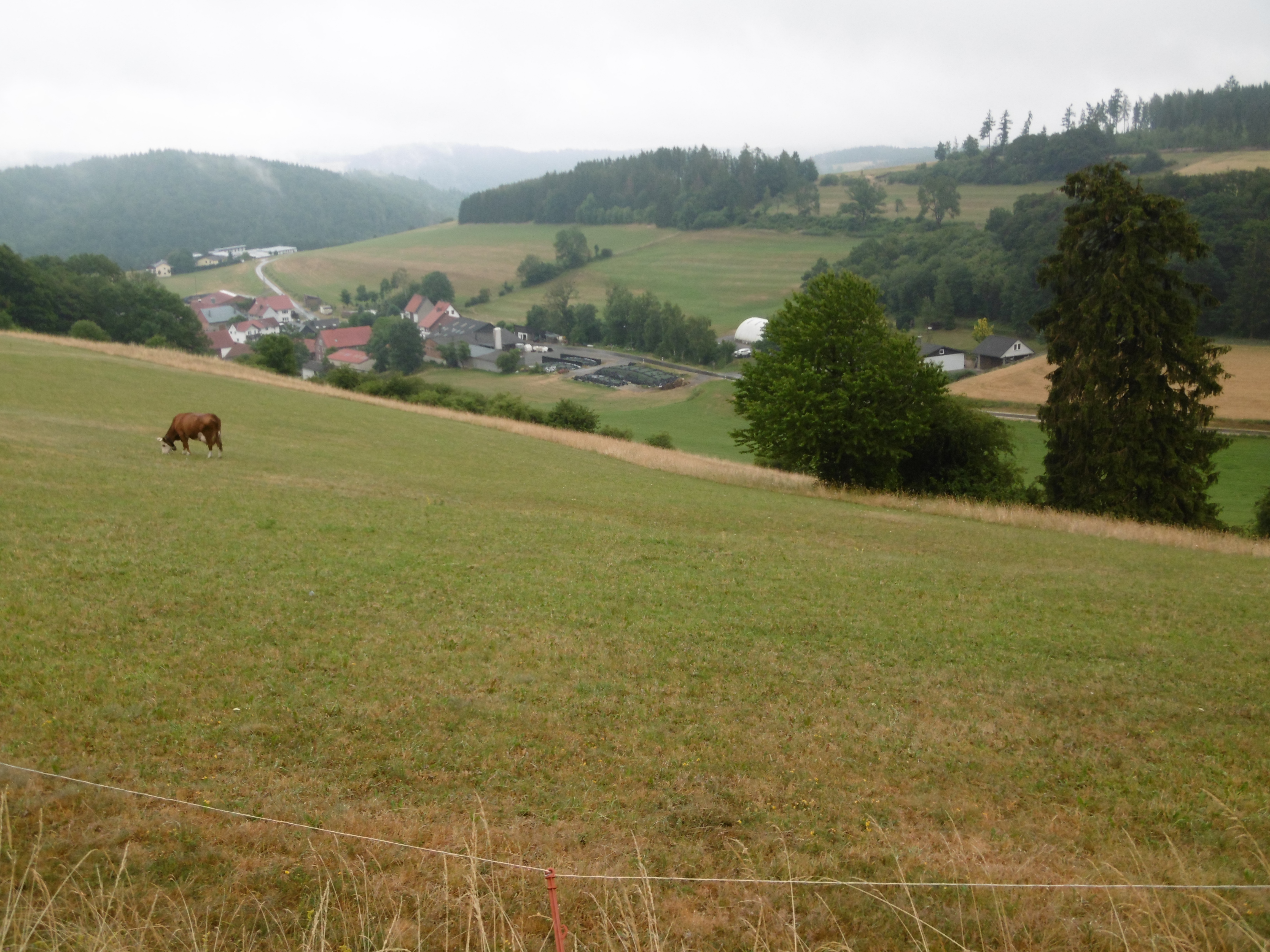 Welleringhausen aus nordwestlicher Richtung.